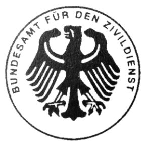 Kleines Bundessiegel einer Bundesoberbehörde der Bundesrepublik Deutschland (Bundesamt für den Zivildienst)